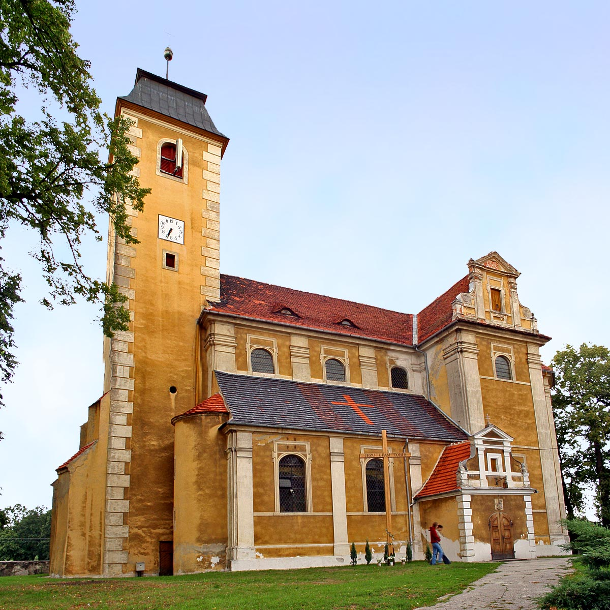 Brzeznica - kosciol barokowy z XVIII w.